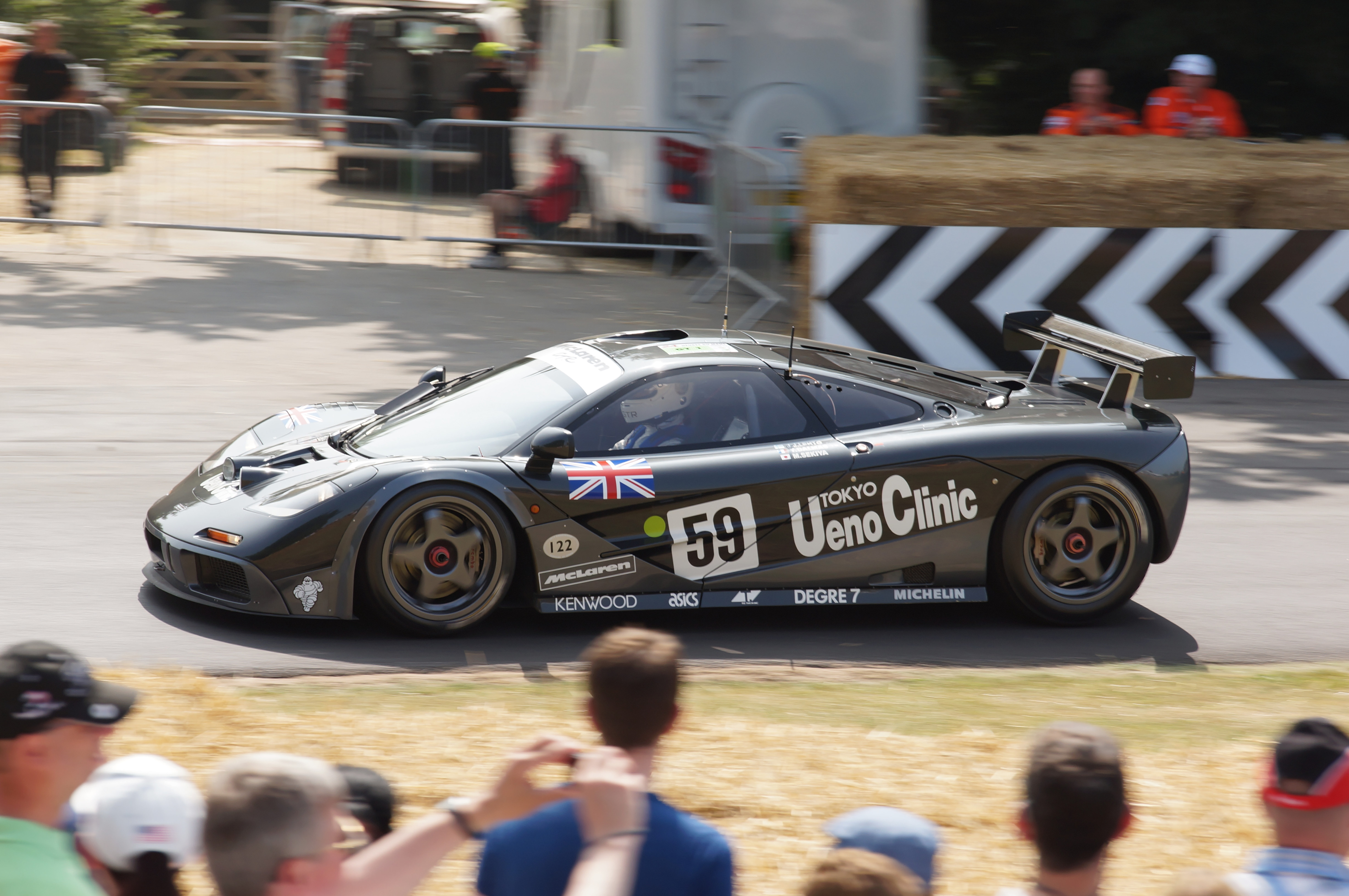 DSC07893_DxO